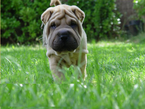 Dakota de Peis Maikan